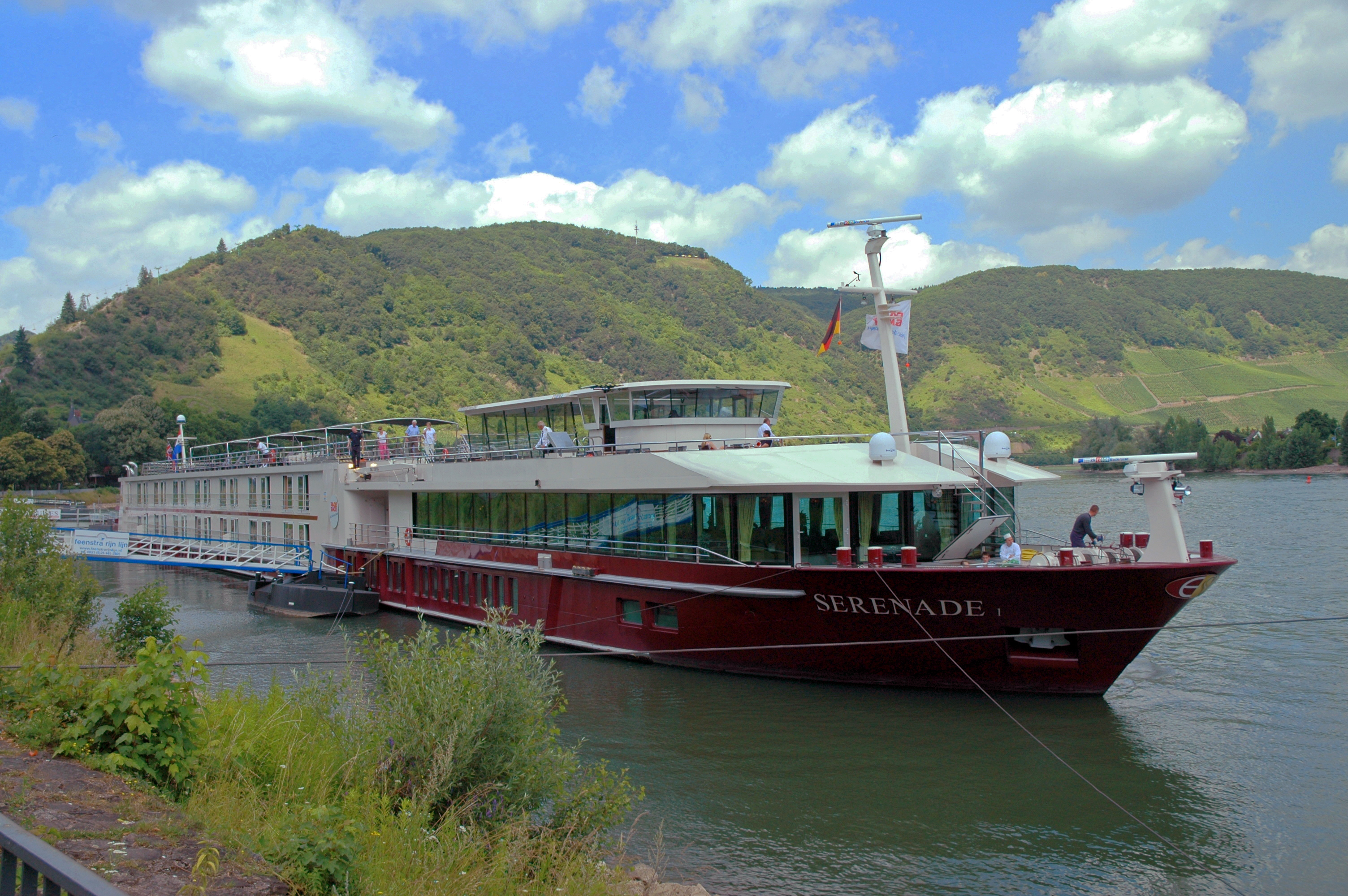 Serenade 1 am Anleger auf dem Mittelrhein